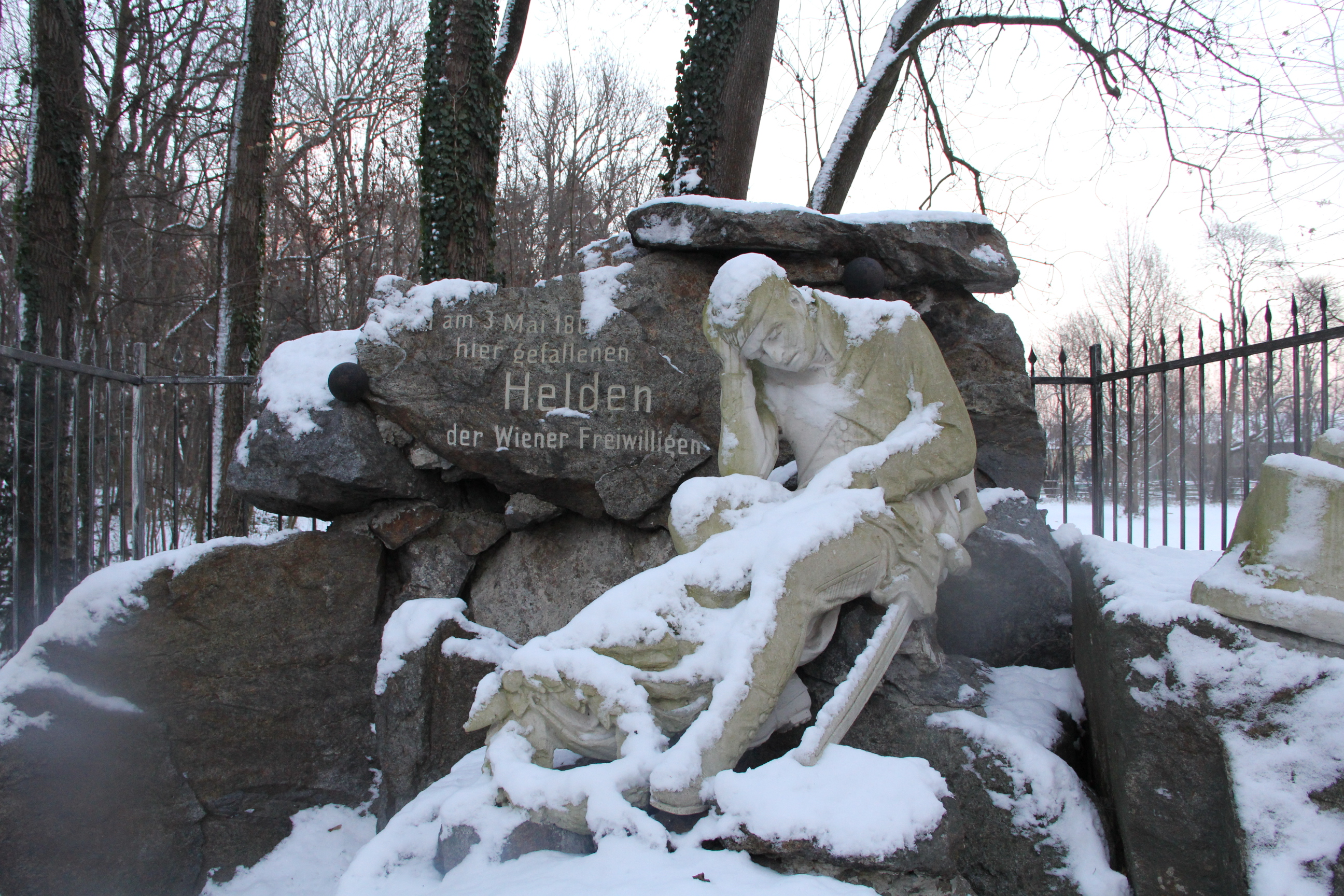 Kriegsdenkmal an die Schlacht gegen Napoleon